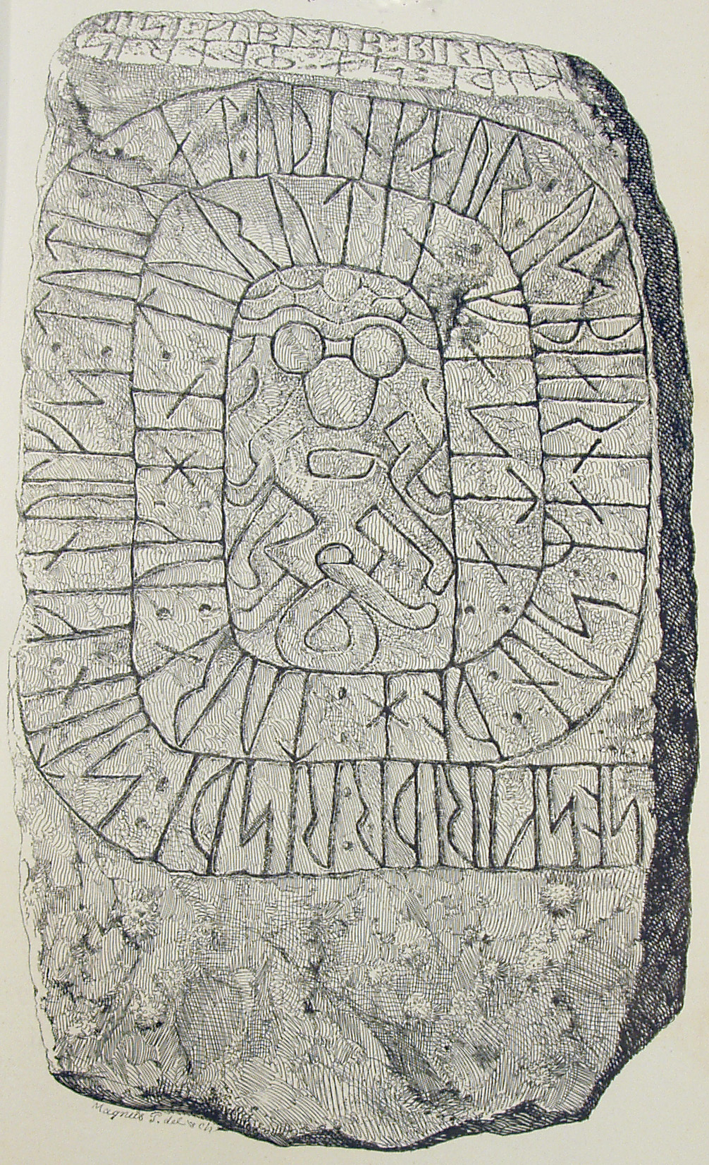 Runestenen Skjern 2 blev fundet i 1843 i fundamentet til en trappe i ruinen af Skjern Slot